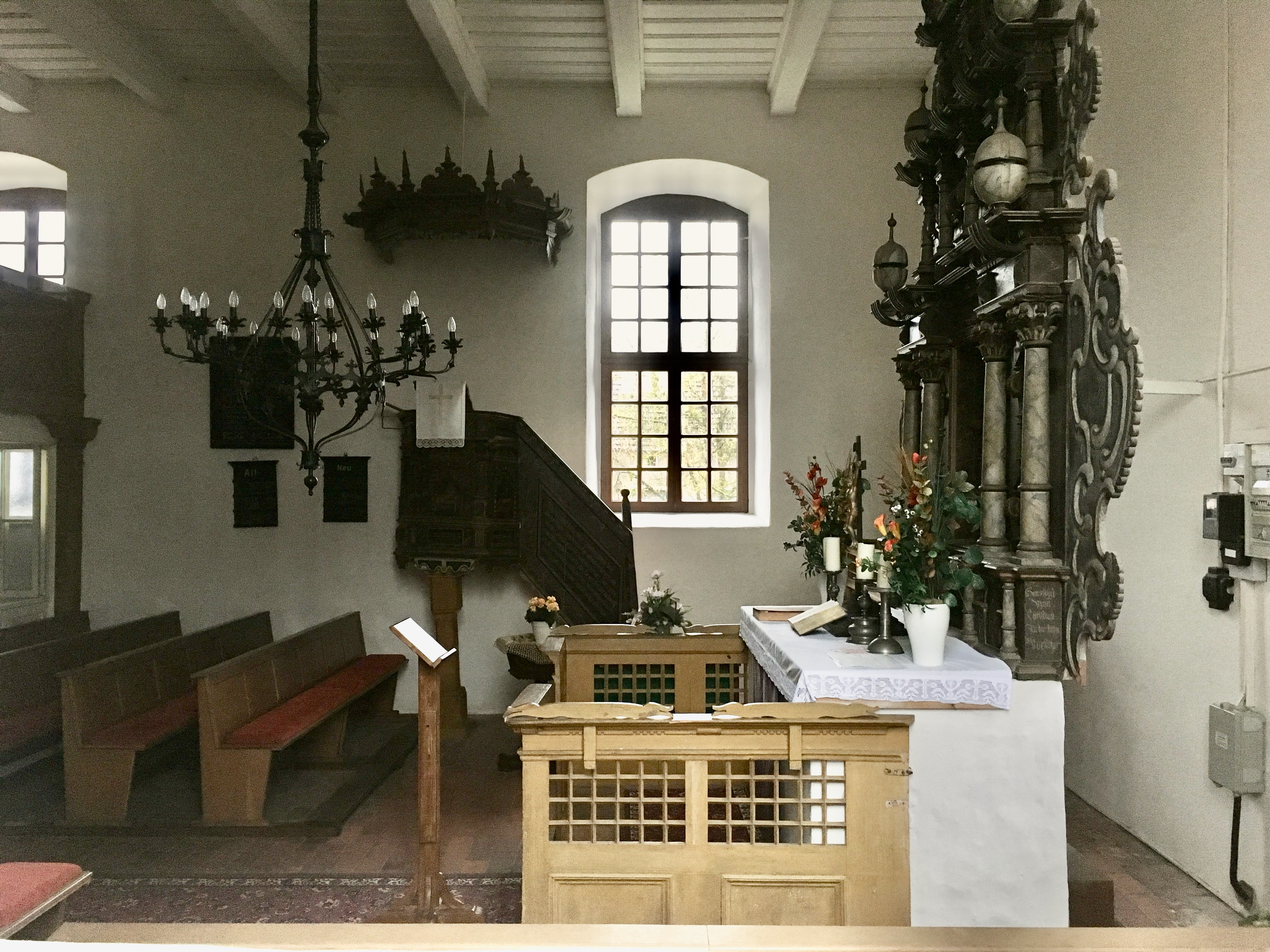 Die Feldsteinkirche in Schweinrich, Wittstock/Dosse entstand vermutlich im 15. Jahrhundert. Im Innern steht unter anderem ein Altarretabel aus dem ersten Viertel des 17. Jahrhunderts.